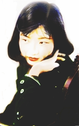 若年期の王莹(CGカラー処理)